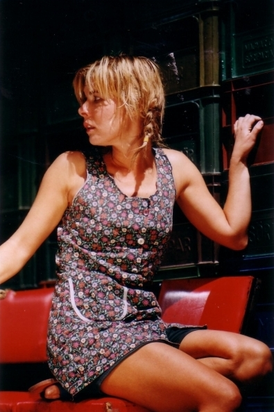 Pelsőczy Réka magyar színésznő, rendező.